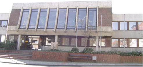 Das Rathaus von Schöppingen